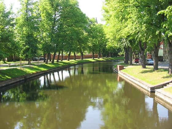 Stepenitz in Perleberg, Brandenburg fotografiert im Mai 2005 von Lienhard Schulz